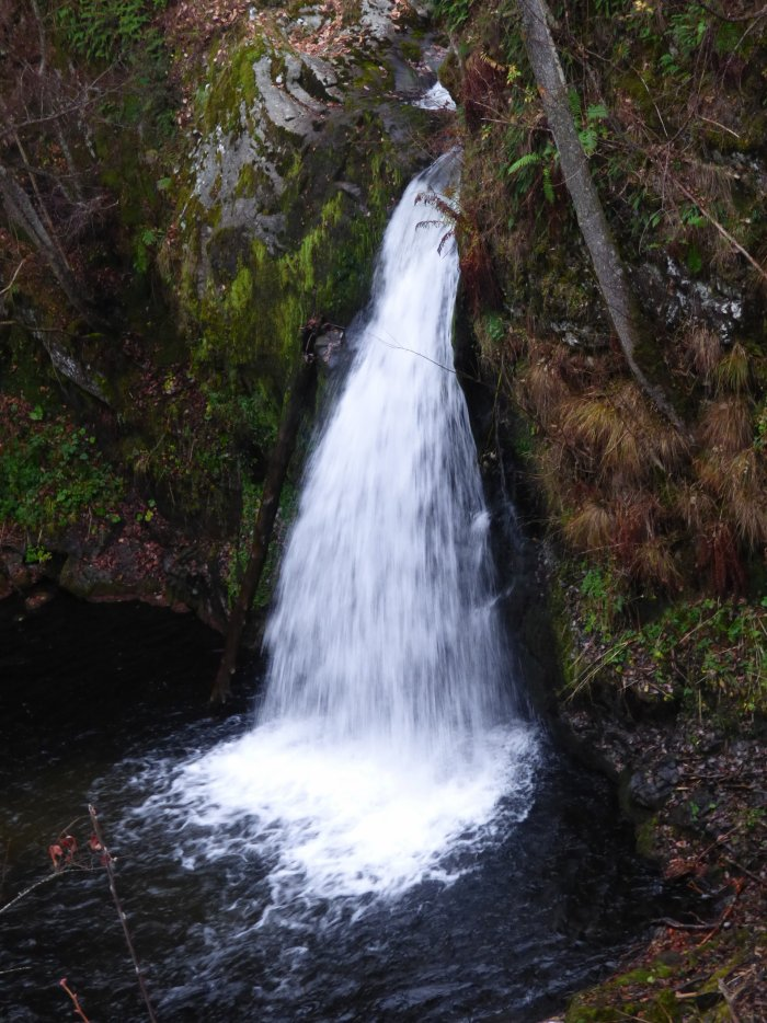 Cascade Ste Elisabeth, Auvergne